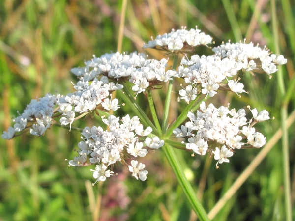 Oenanthe silaifolia à Saint-Quentin-en-Tourmont (80) ref photo : urn:lsid: :celpic:39763